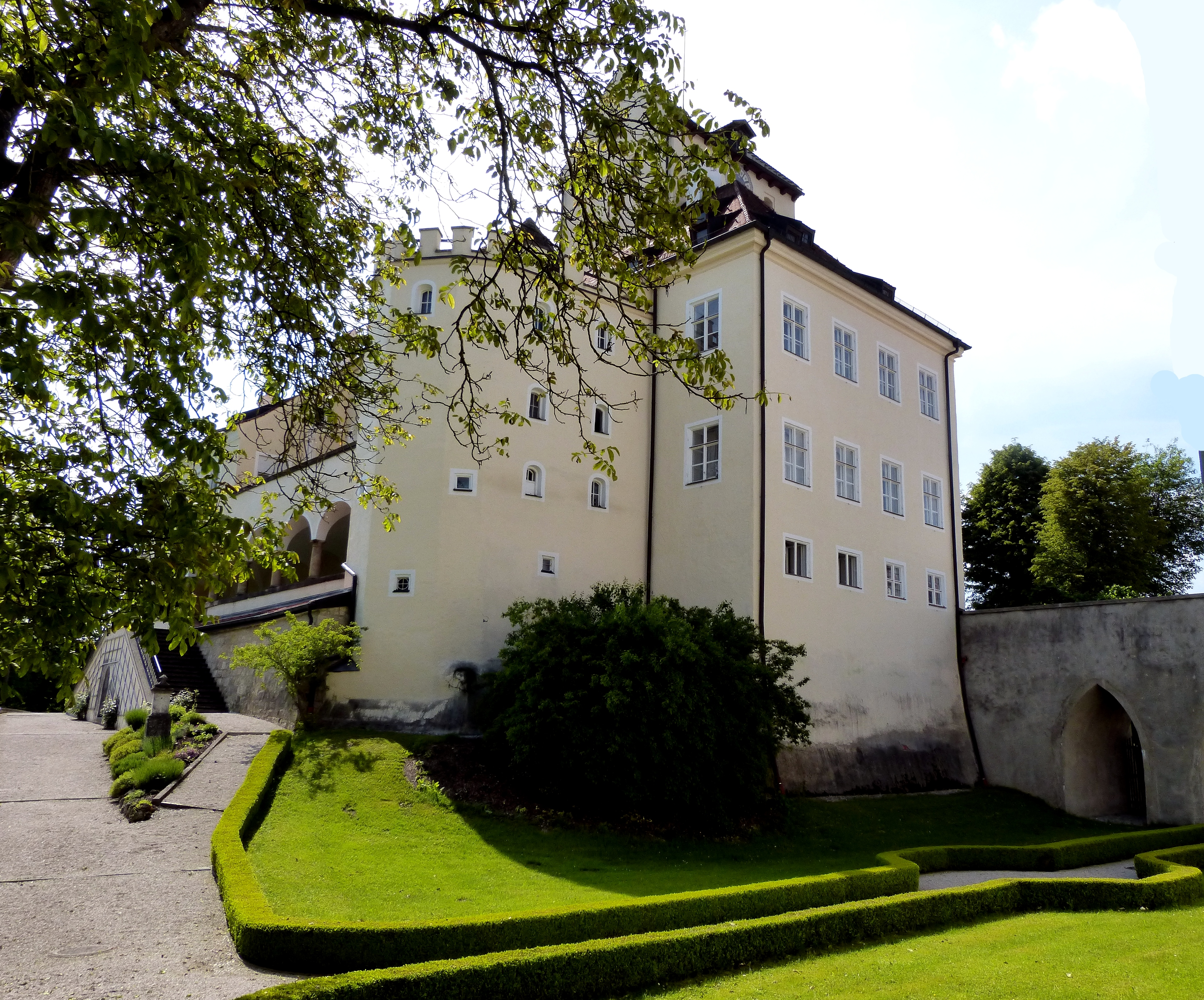 Seefeld, Schloss Seefeld, im Vordergrund der innere Schlossgraben.